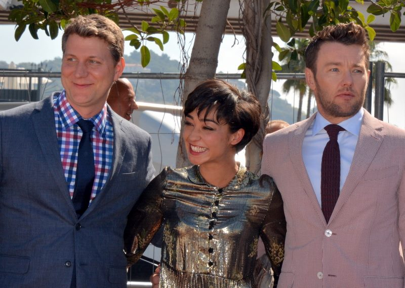 Présentation du film "Loving" au festival de Cannes : de gauche à droite Jeff Nichols, Ruth Negga, Joel Edgerton